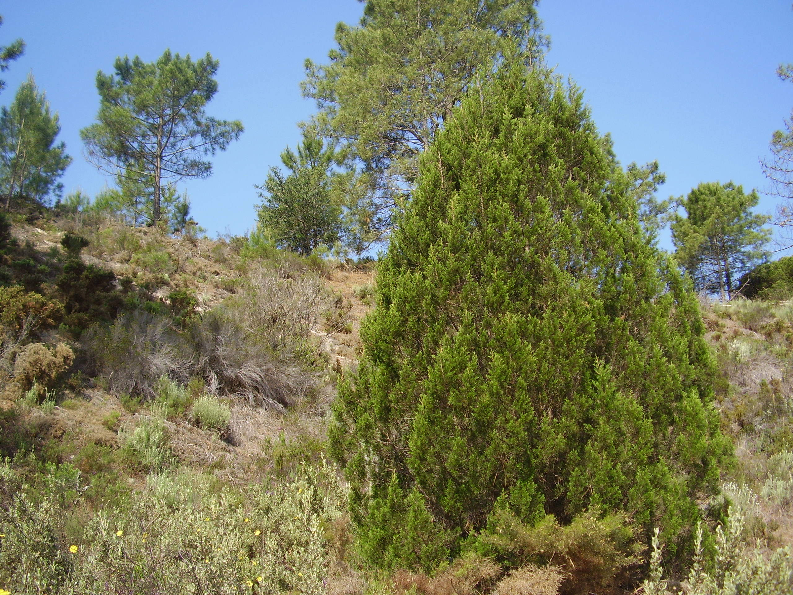 Juniperus phoenicea, Melides (Grândola, Portugal)